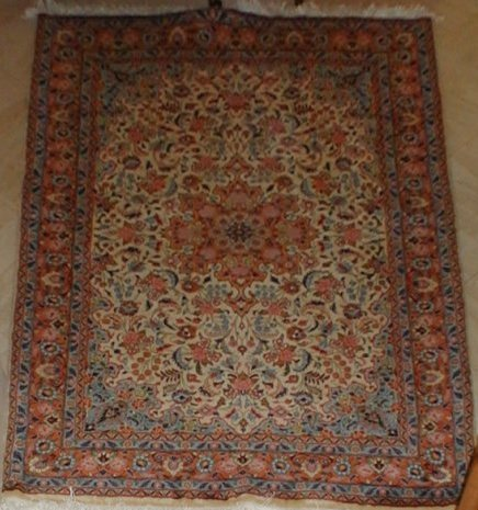 Hamedan rug